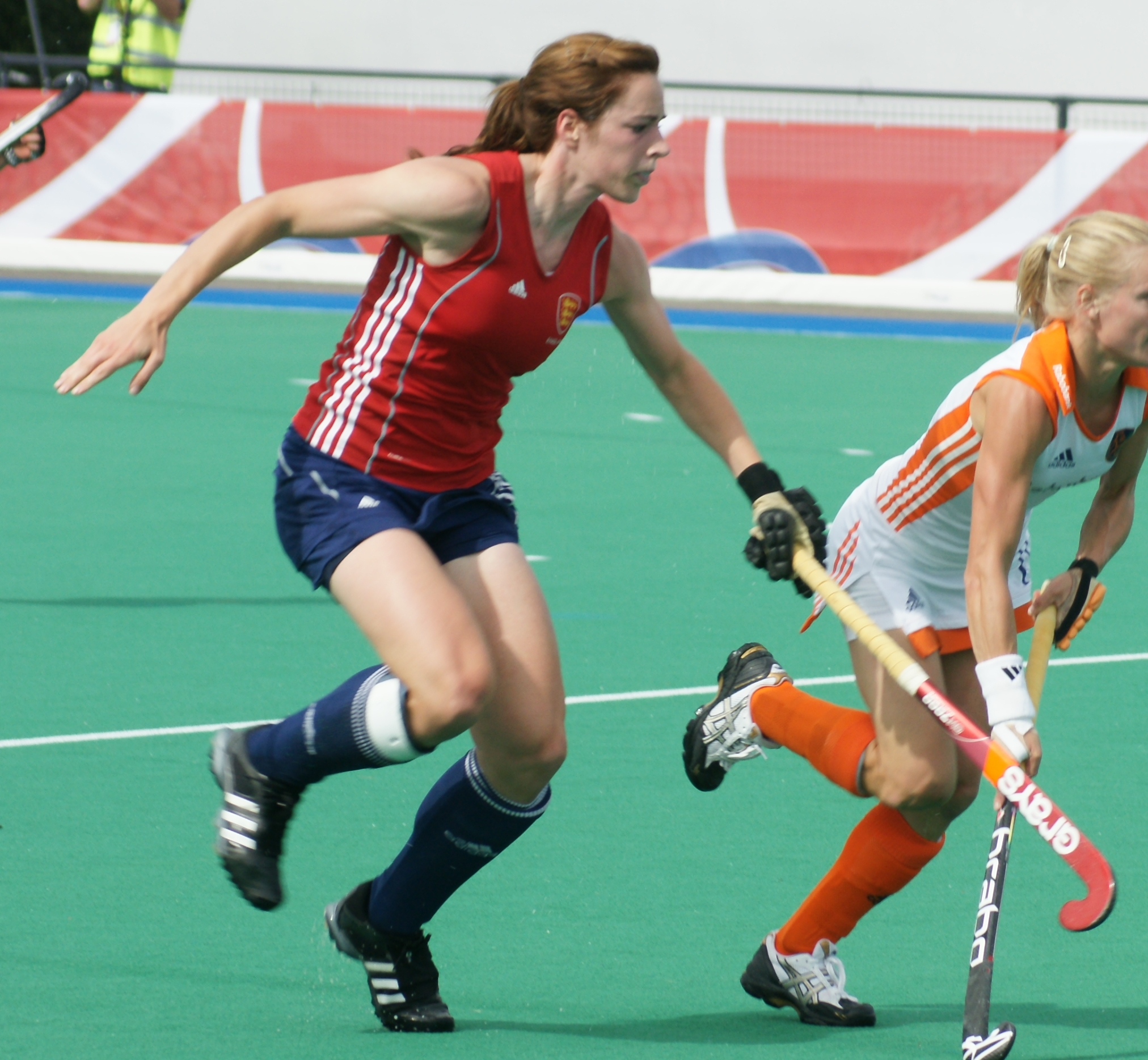 Katie Long